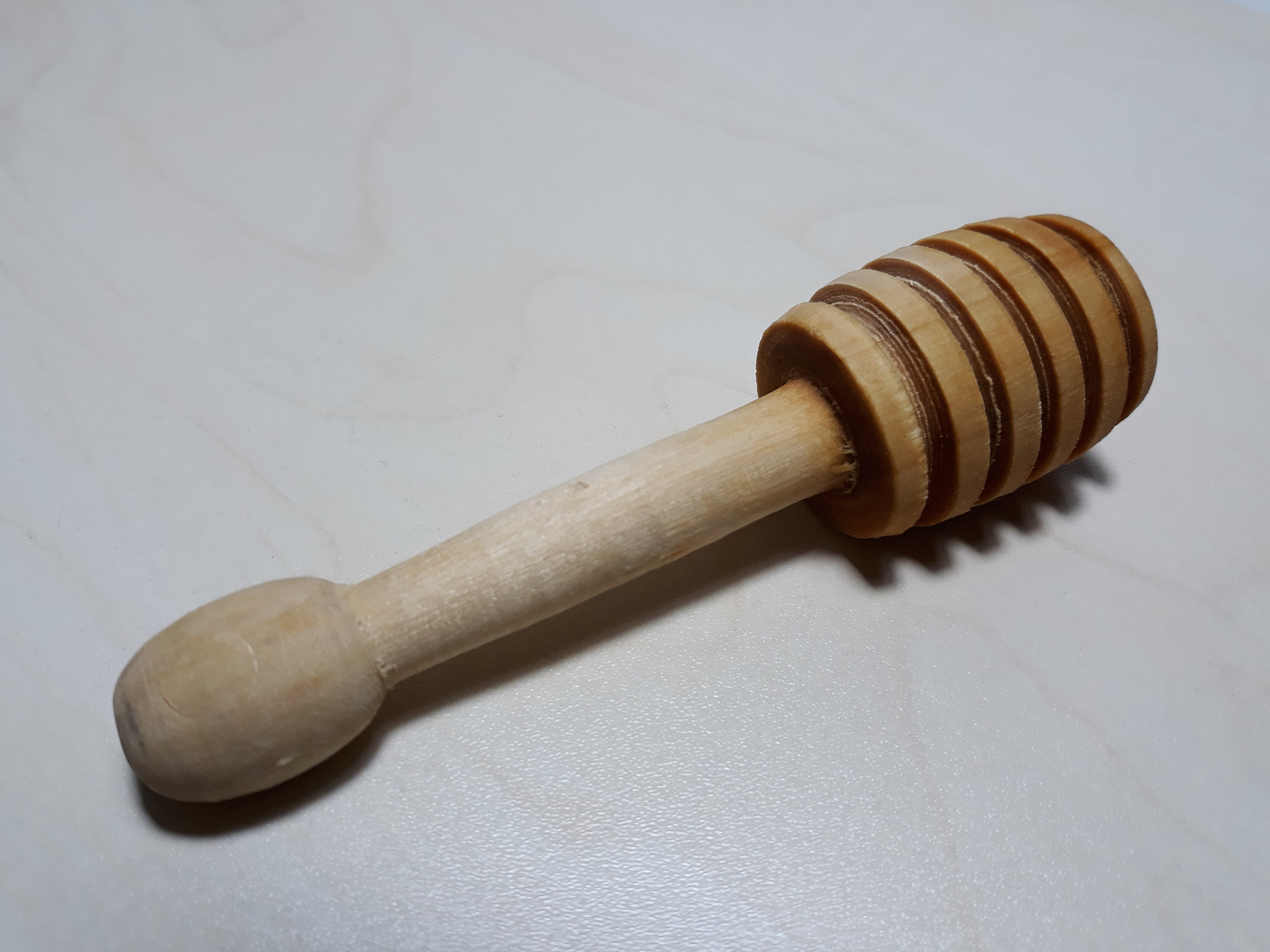 a wooden one